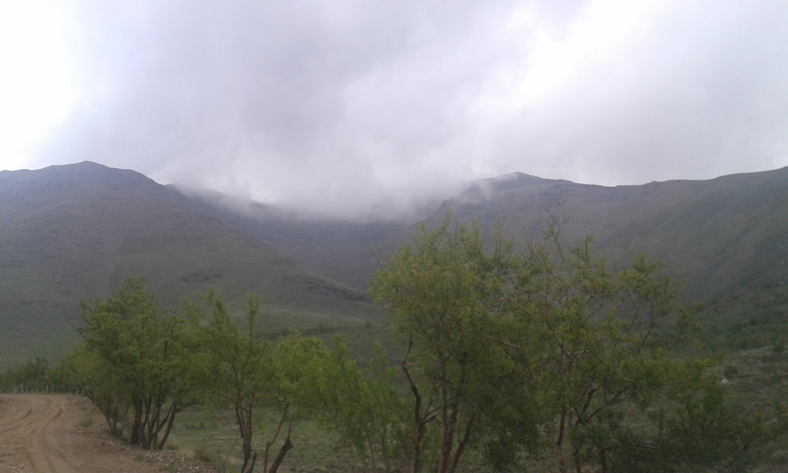 شهرستان اراک